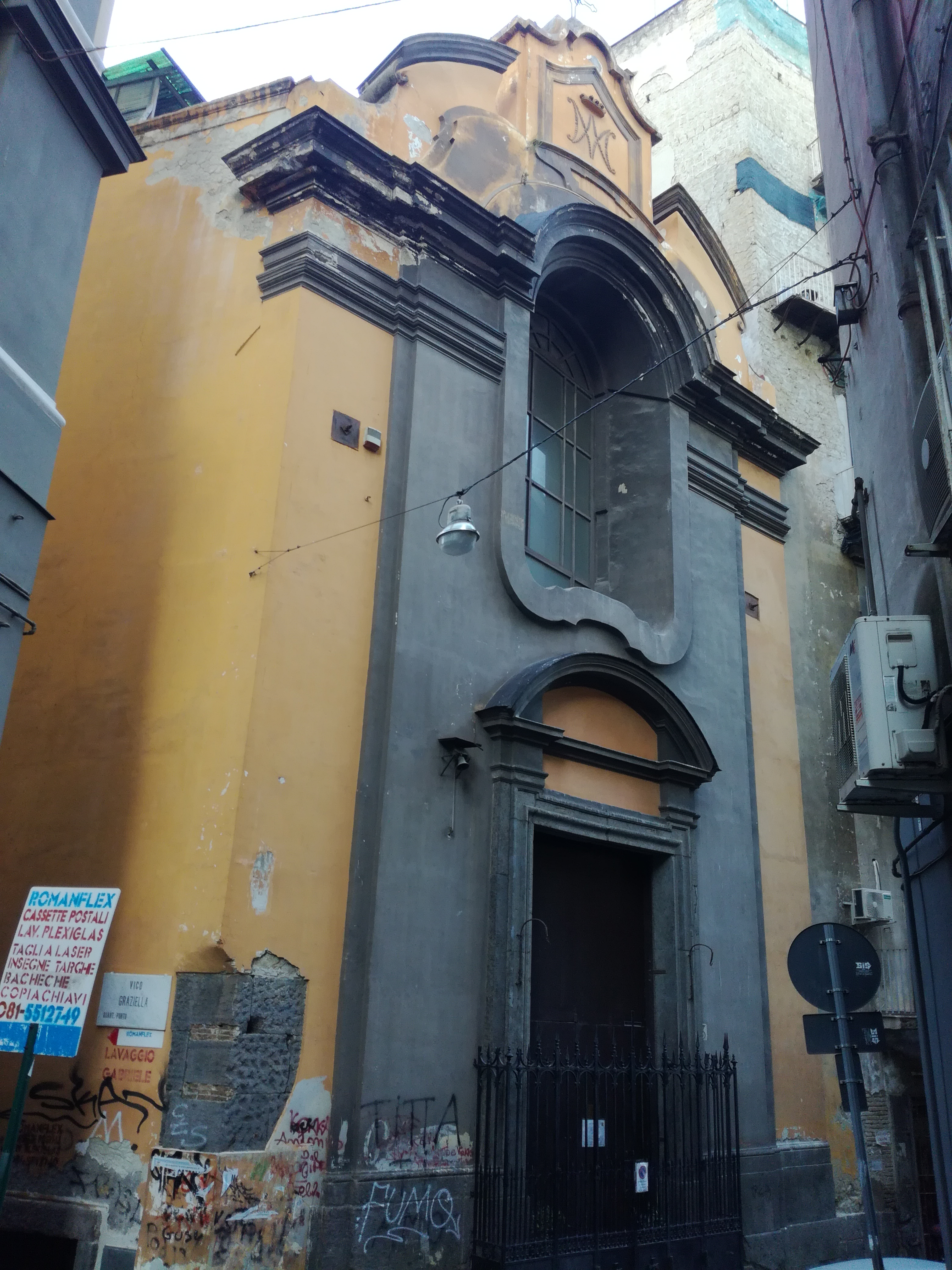 Facciata di Santa Maria delle Grazie detta la Graziella, Napoli